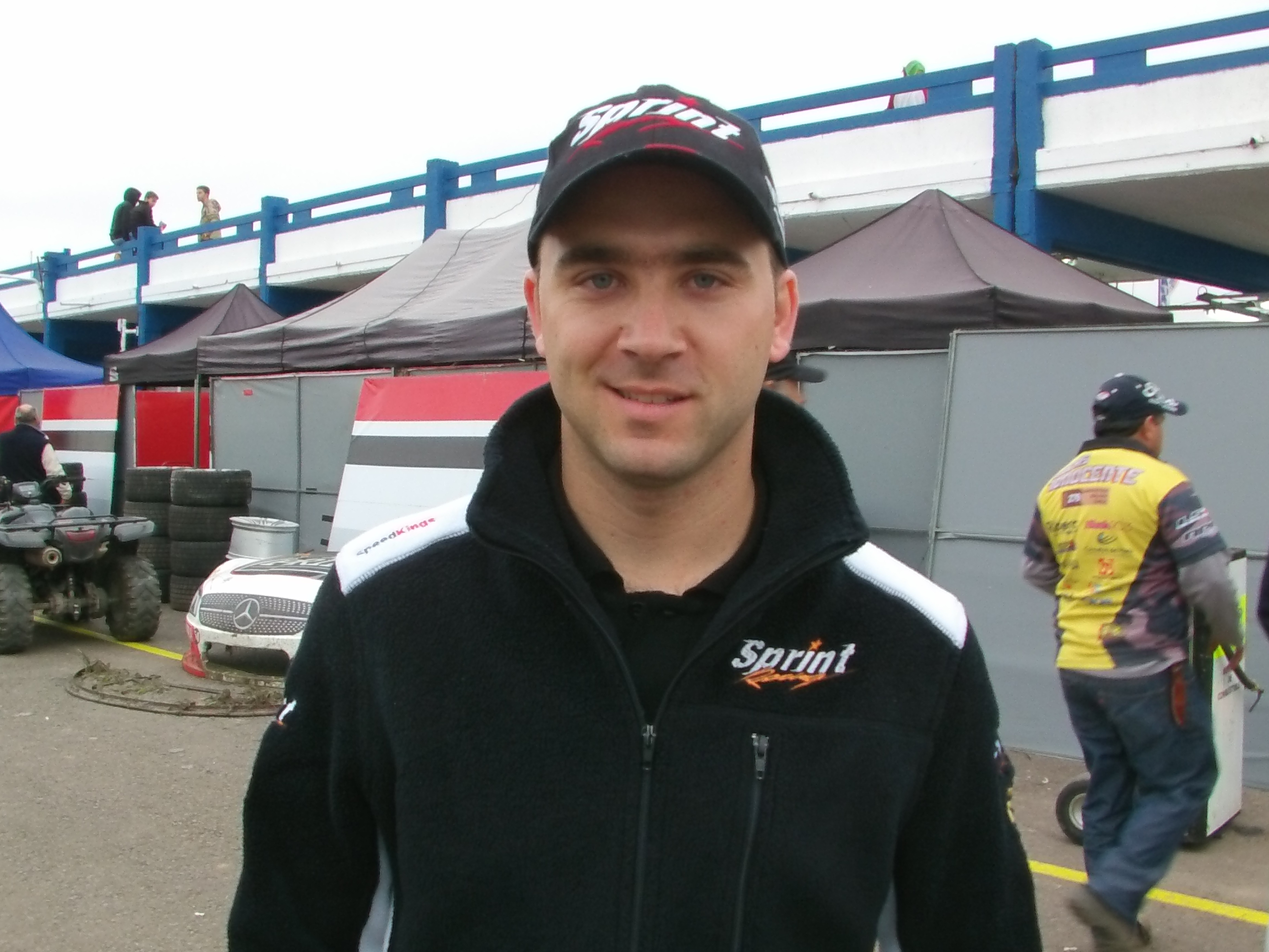 Ricardo Risatti III, piloto argentino de automovilismo de velocidad. Participante de categorías como el Turismo COmpetición 2000, Turismo Carretera, Turismo Nacional, Top Race y Súper TC 2000.